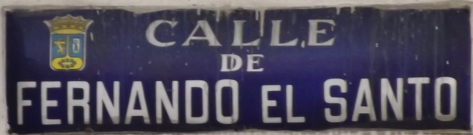 Placa de la calle de Fernando el Santo, Madrid.